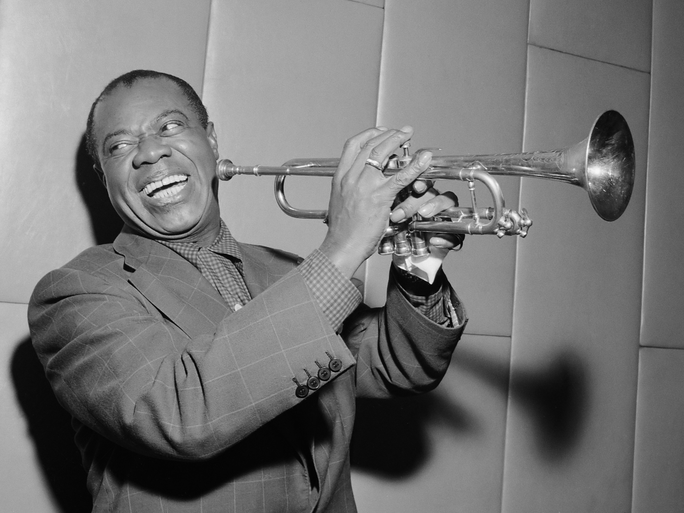 Louis Armstrong bezoekt Amsterdam 29 oktober 1955